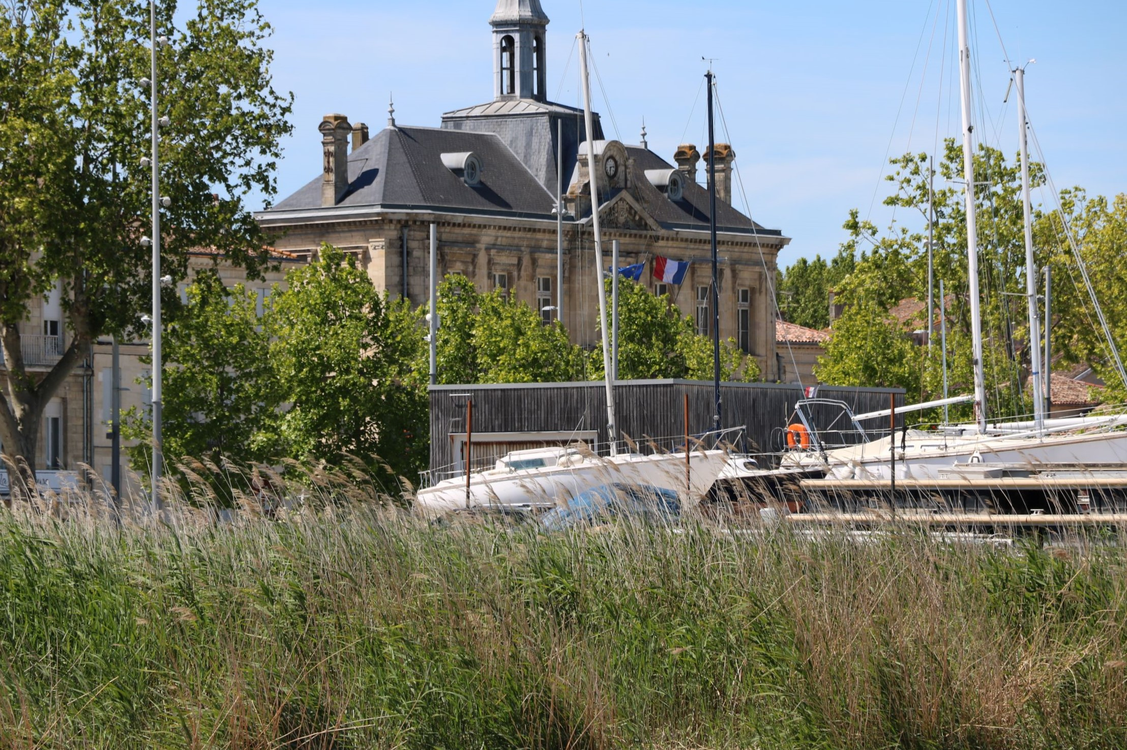 La mairie de Pauillac vue depuis le port de plaisance La Fayette